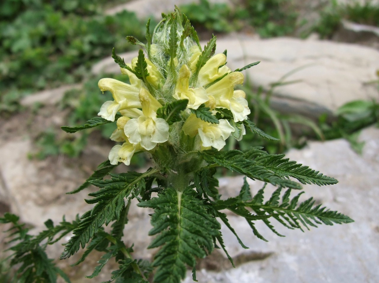 Pedicularis hacquetii (habitat:Tatra Mountains, ścieżka do Kobylarzowego Żlebu)